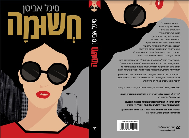 עטיפת הספר חשומה.